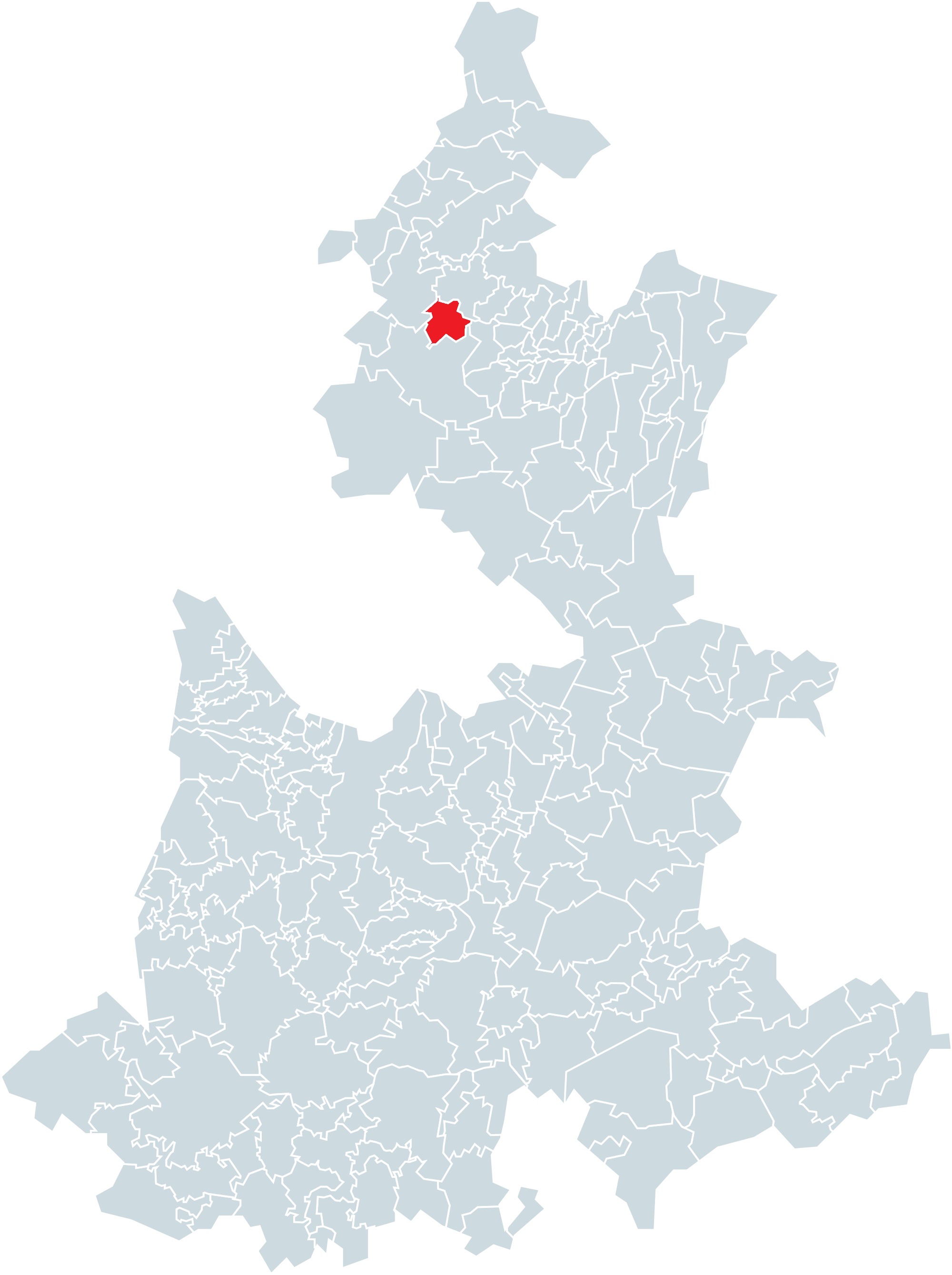 Municipio de Chiconcuautla